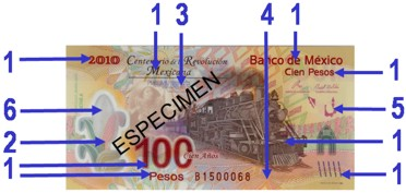 características de seguridad del billete conmemorativo de 100 pesos